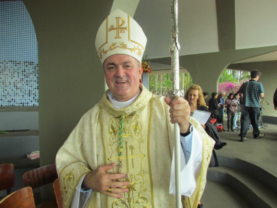 Bispo Diocesano de Erexim